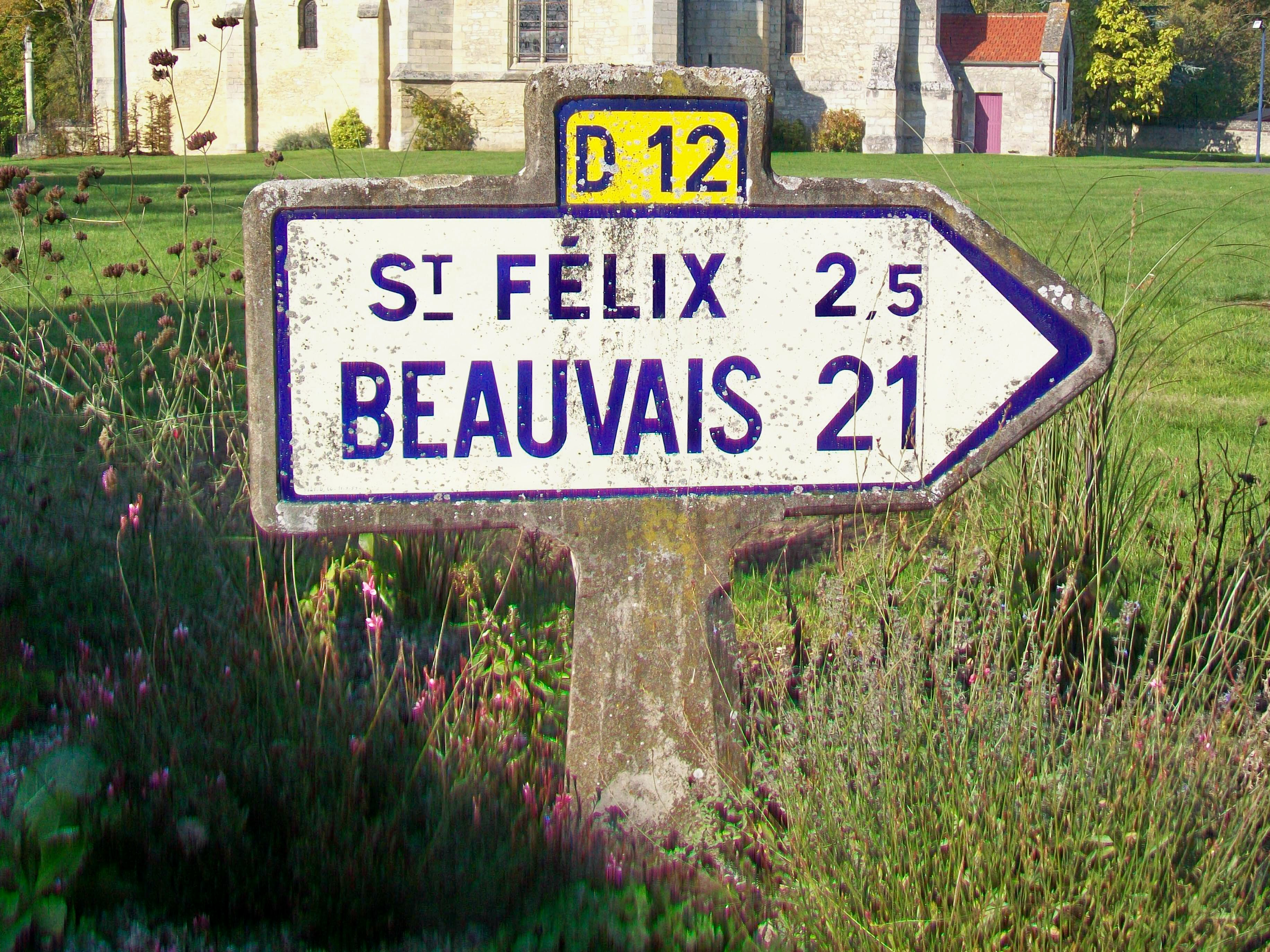 Plaque Michelin de 1959 sur la place de l'Église.